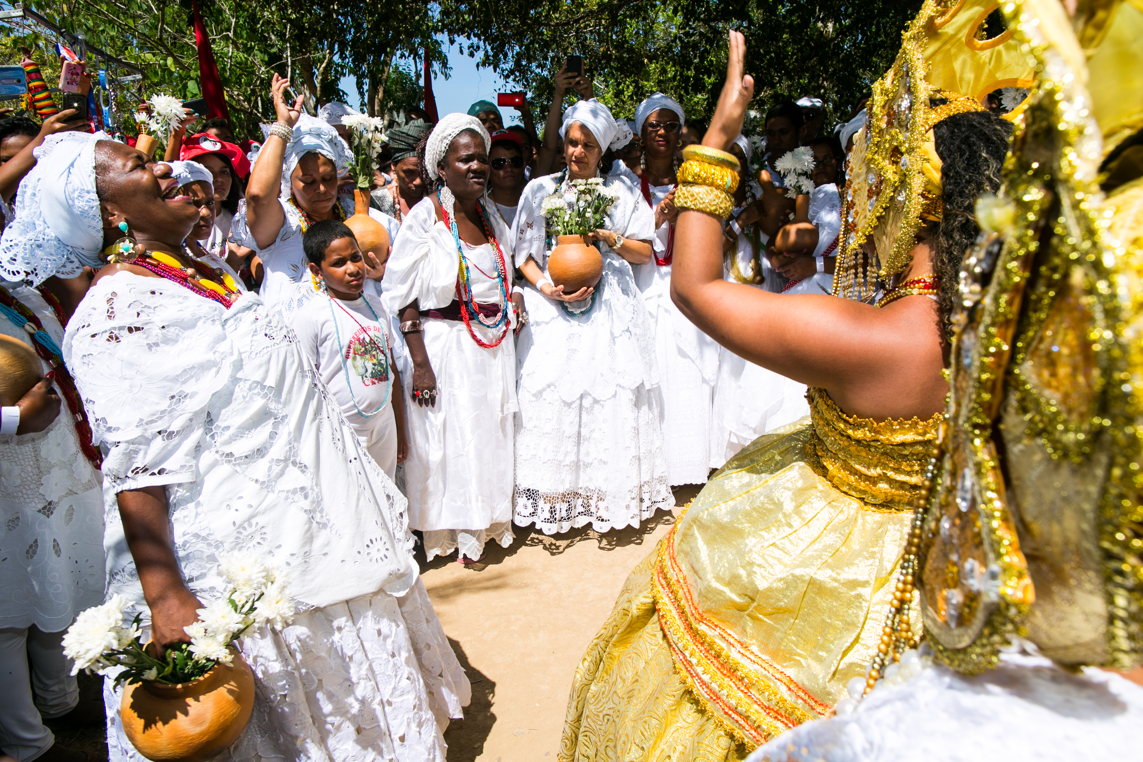 Foto:LiadePaula/MinC Quliombo dos Palmares-AL 20/11/2015